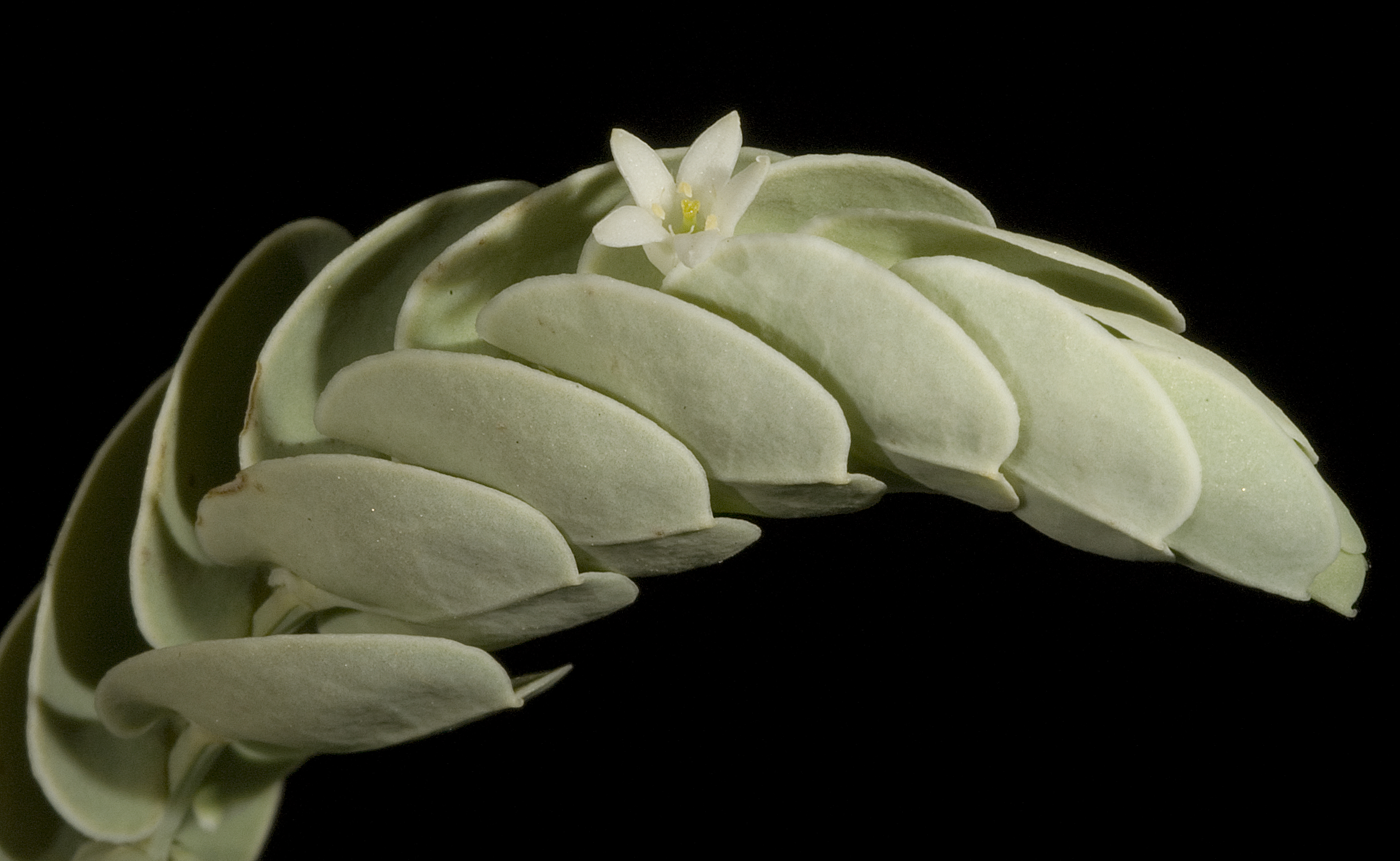 KRT3137